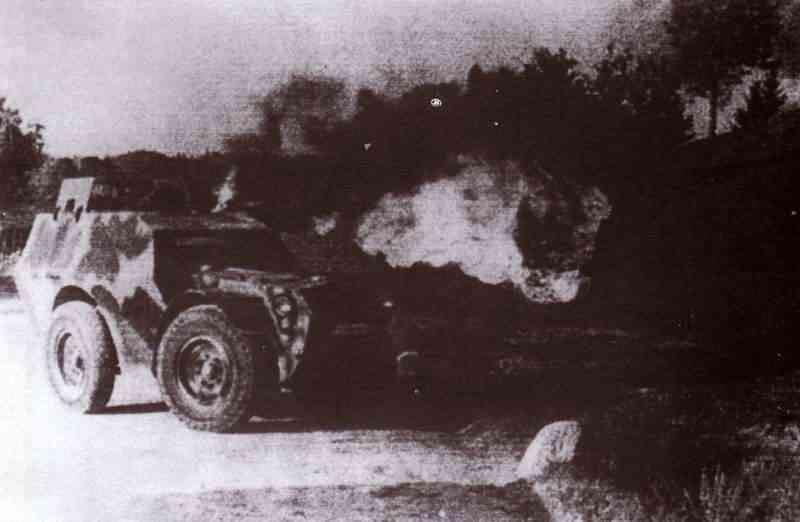 fiat spa s37